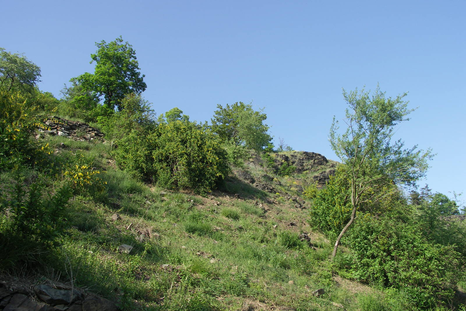 Přírodní památka Bohnické údolí, Praha, Czech Republic Jiří Vackář 23:04, 11 May 2006 (UTC)